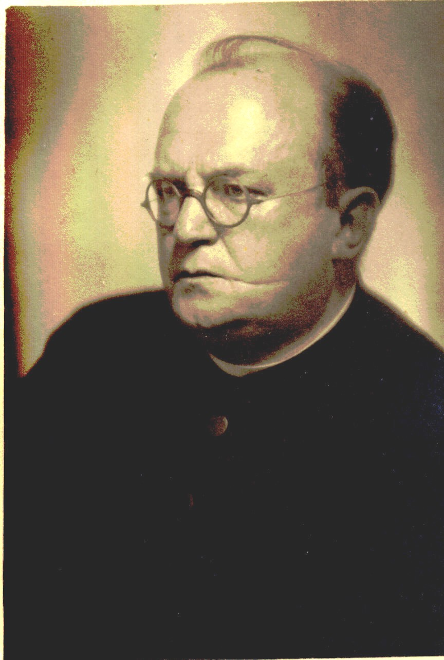 Dr. Carl Sonnenschein. Foto-Postkarte Atelier Elite, Berlin. Undatiert, etwa 1925.